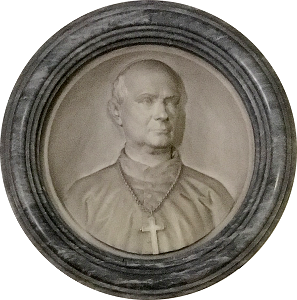 Ritratto del cardinale Pier Francesco Meglia parte della lapide tombale conservata presso la chiesa di Santo Stefano al Mare.